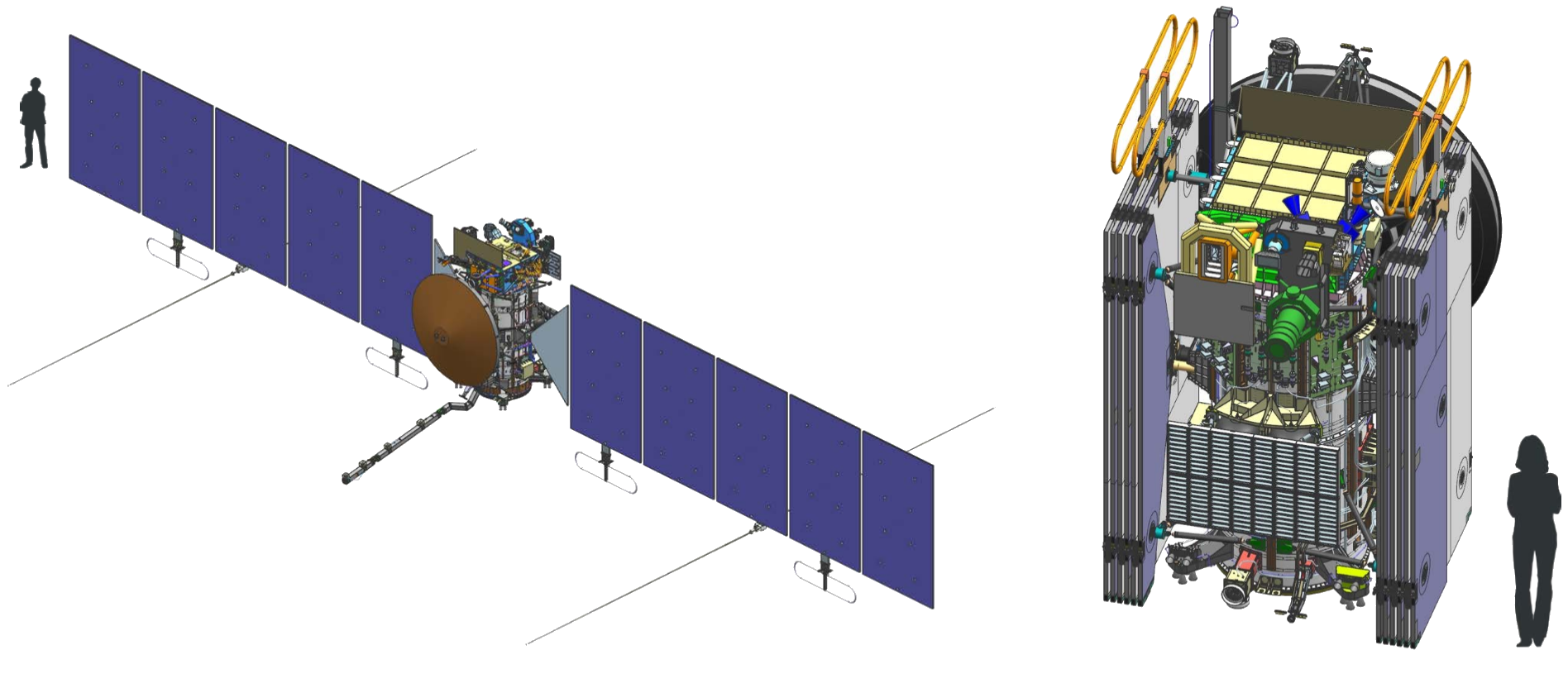 Schéma Europa Clipper en configuration de vol et de lancement